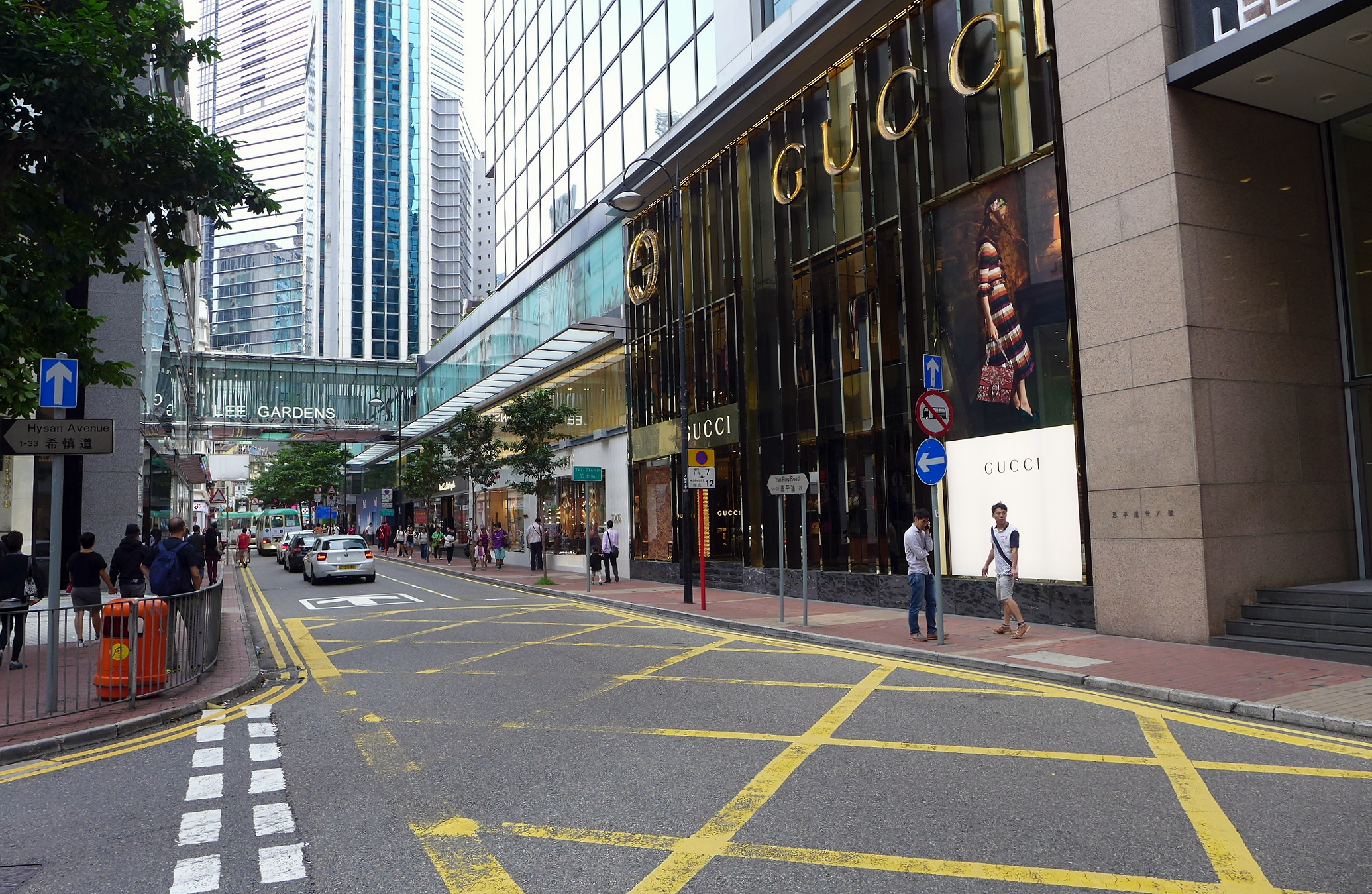 Yun Ping Road, Causeway Bay